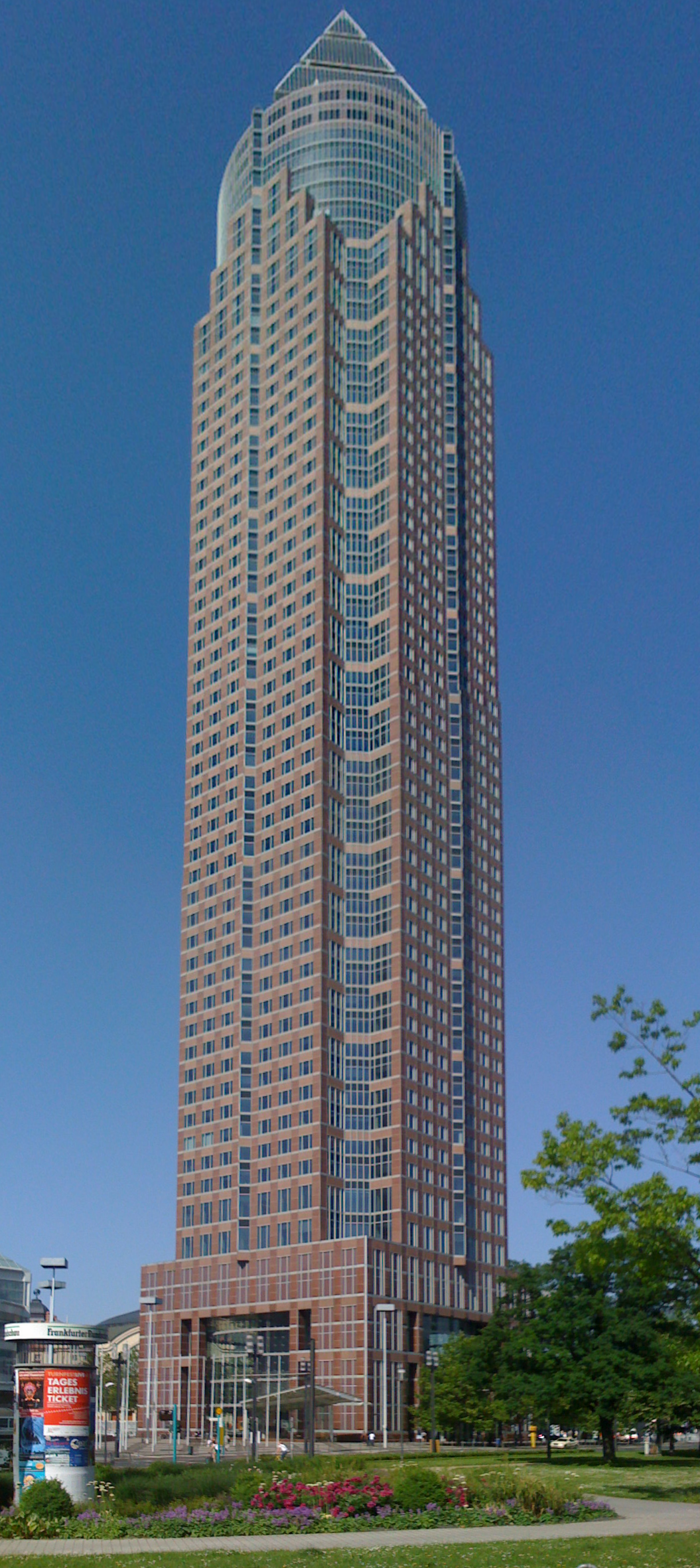 Messeturm, Frankfurt